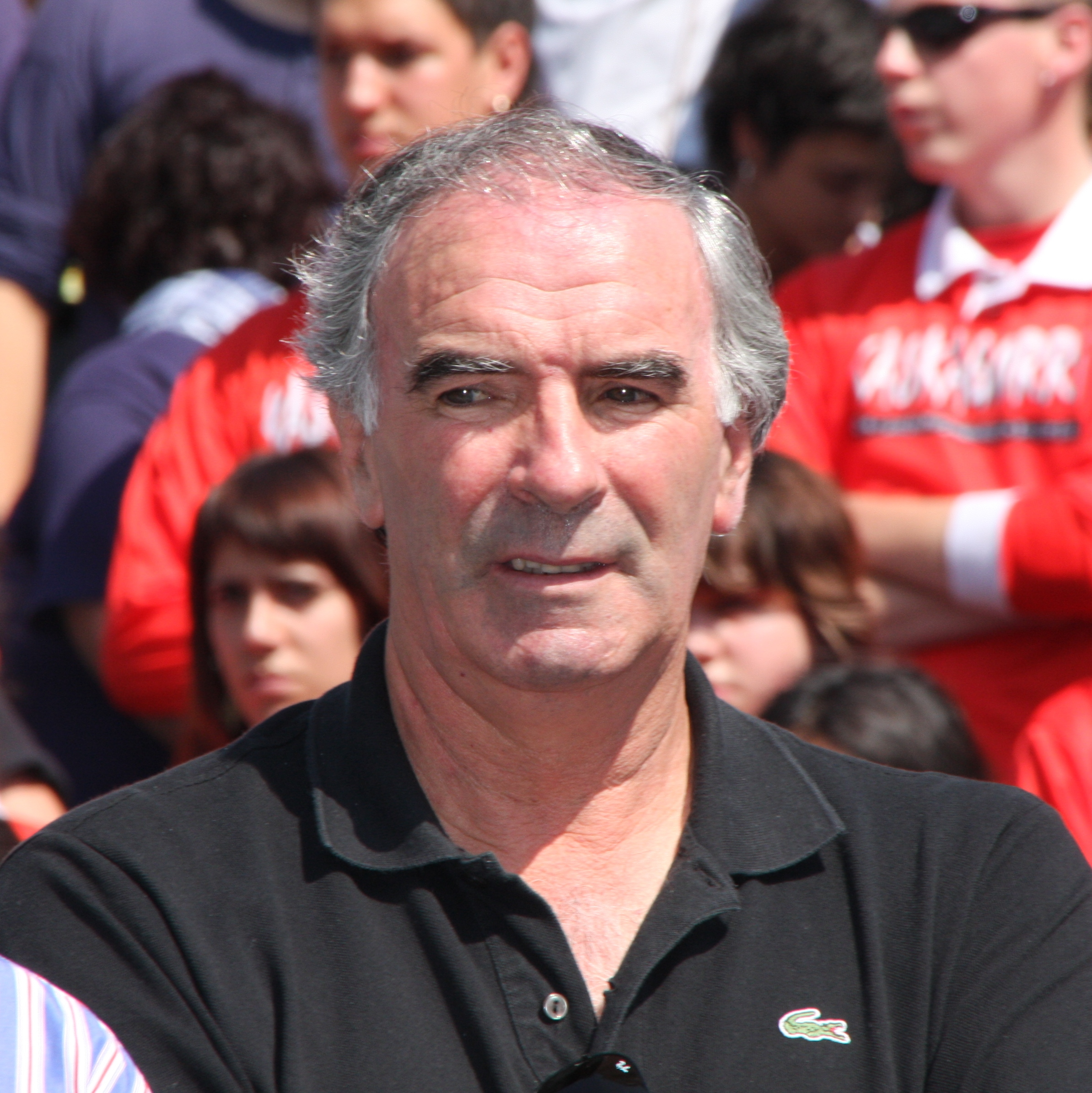 José Ángel Iribar, ex portero y directivo del Athletic Club de Bilbao, en un acto de apoyo a Sonia Polo, comparsera y activista que había recibido amenazas tras ser elegida txupinera de la Semana Grande de Bilbao (España) de 2009.